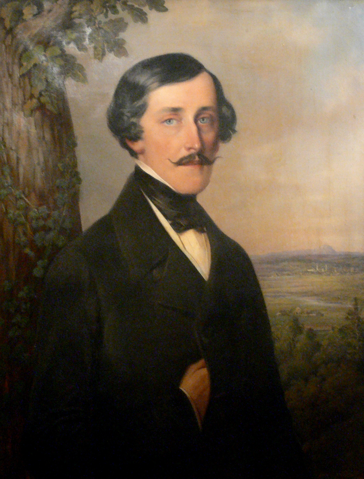 Erbgraf Otto von Quadt-Wykradt-Isny (1817-1899)